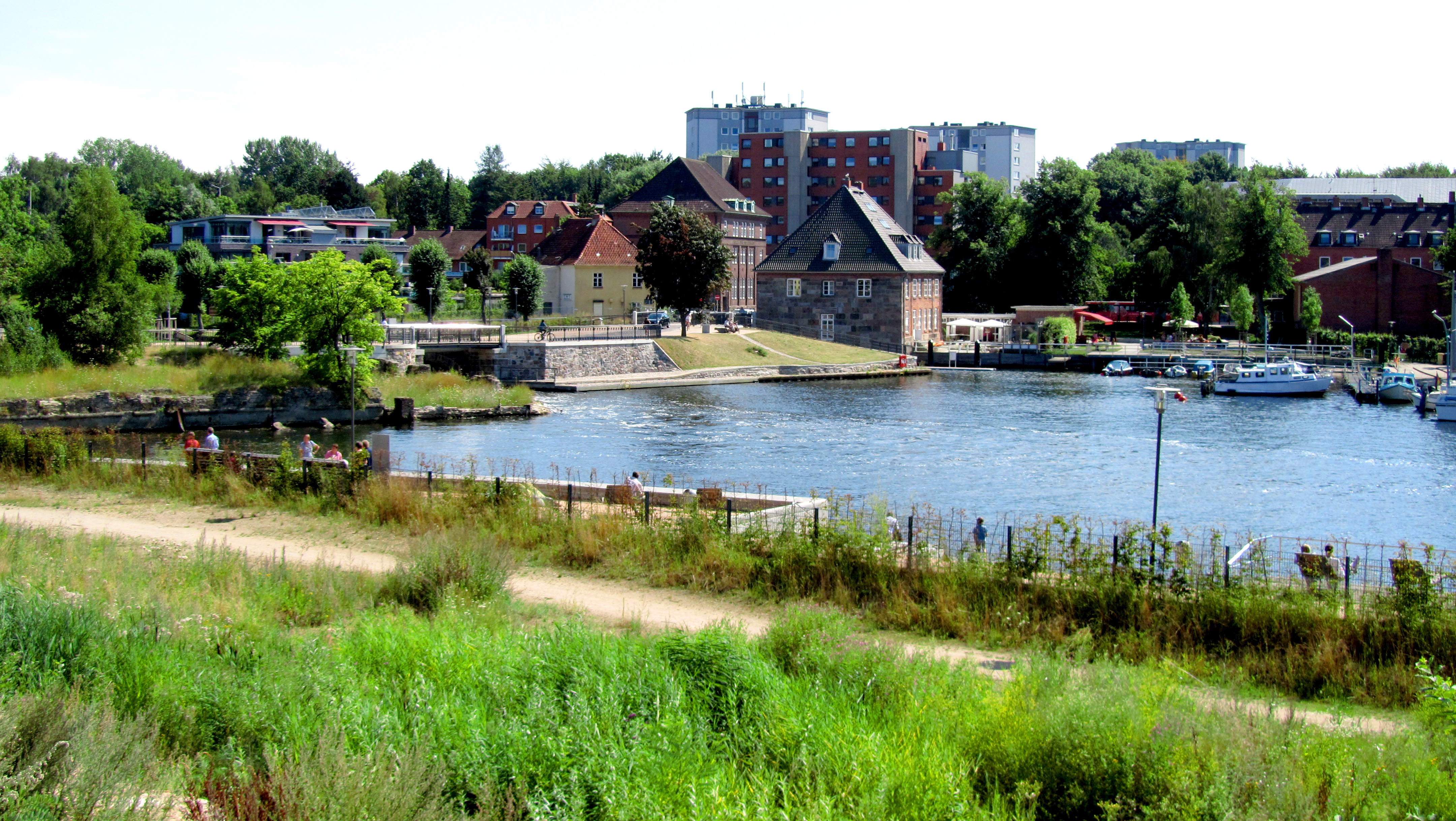 Alte Schwentinebrücken an der Schwentinemündung zwischen Kiel-Neumühlen-Dietrichsdorf und Kiel-Wellingdorf